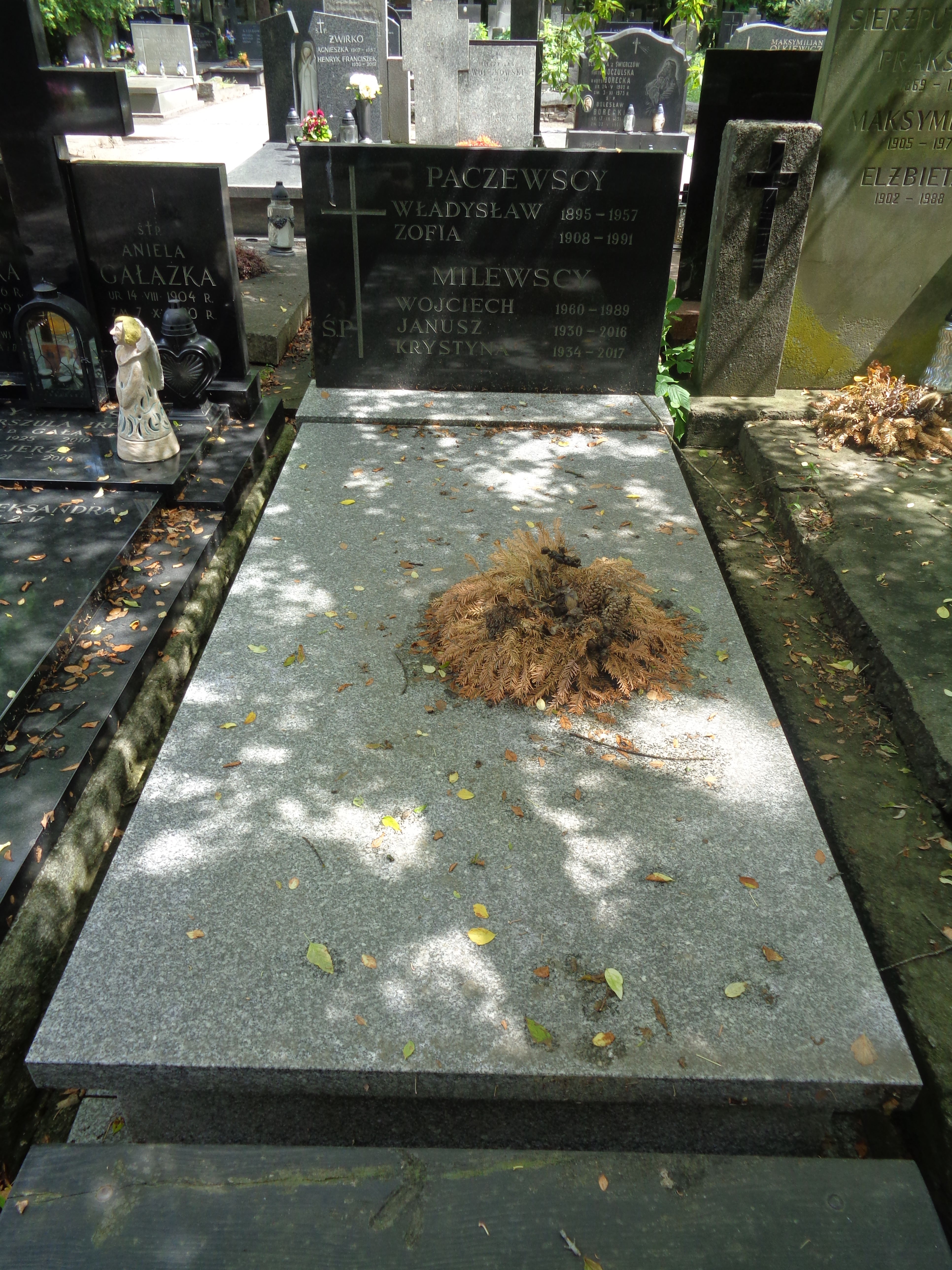 Grób Janusza Milewskiego na Cmentarzu Powązkowskim